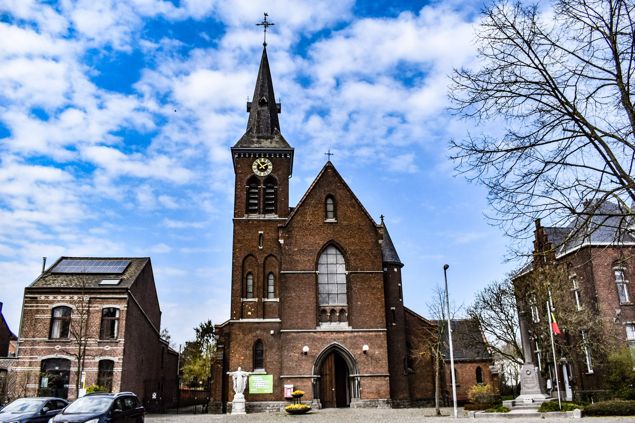 hadr